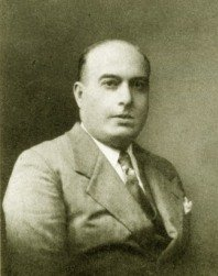 Adolfo Callegari (1882-1947), pittore, archeologo e direttore del Museo nazionale atestino di Este (Padova), del Museo provinciale di Torcello (Venezia) e del Museo di Belluno